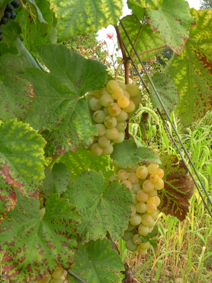 Cépage Noah